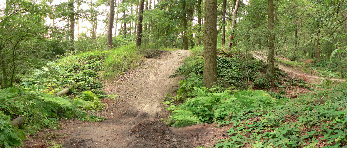 Burghügel von Burg Heeßel